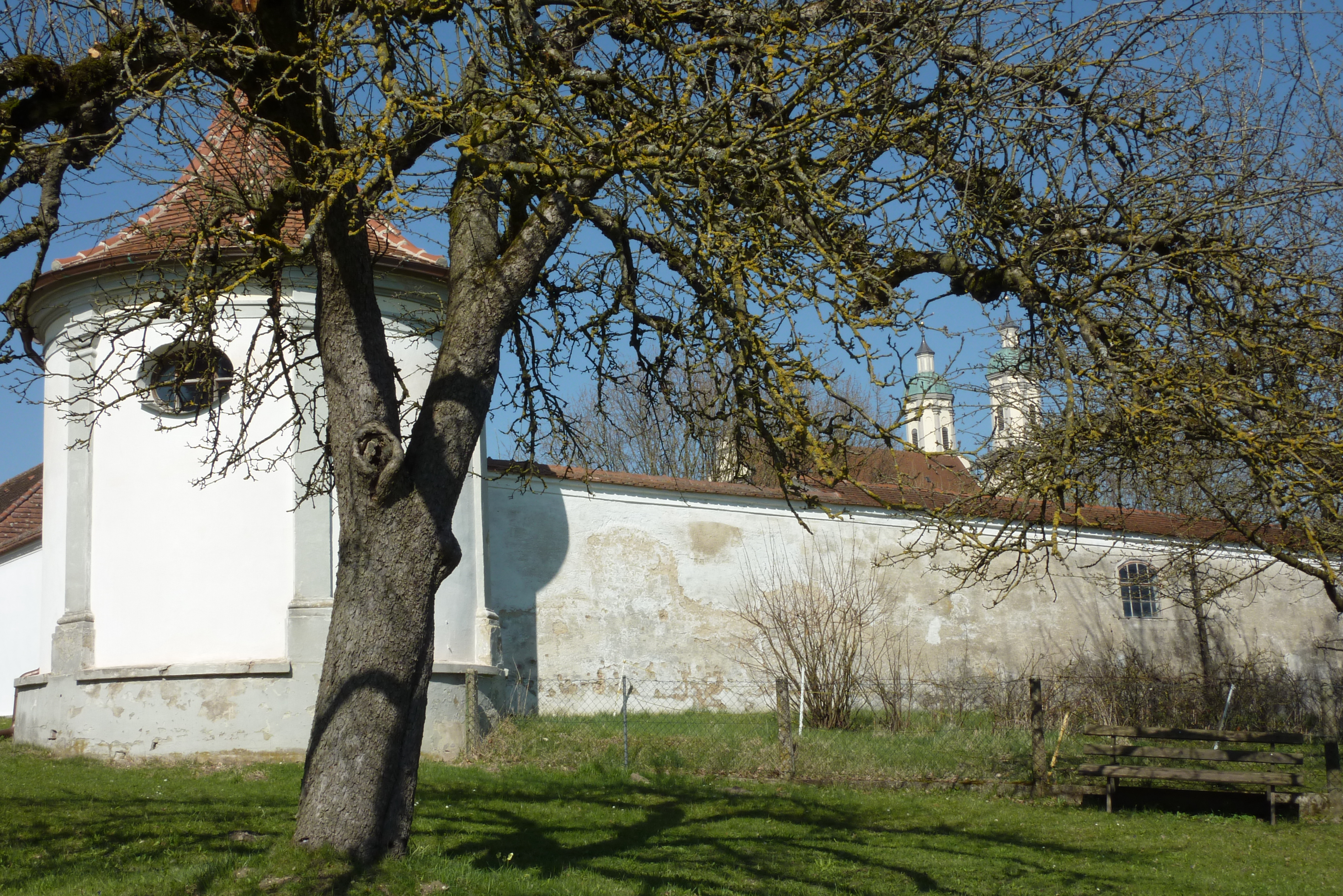 Ehemaliges Benediktinerinnenkloster Kloster Holzen in Allmannshofen im Landkreis Augsburg (Bayern)